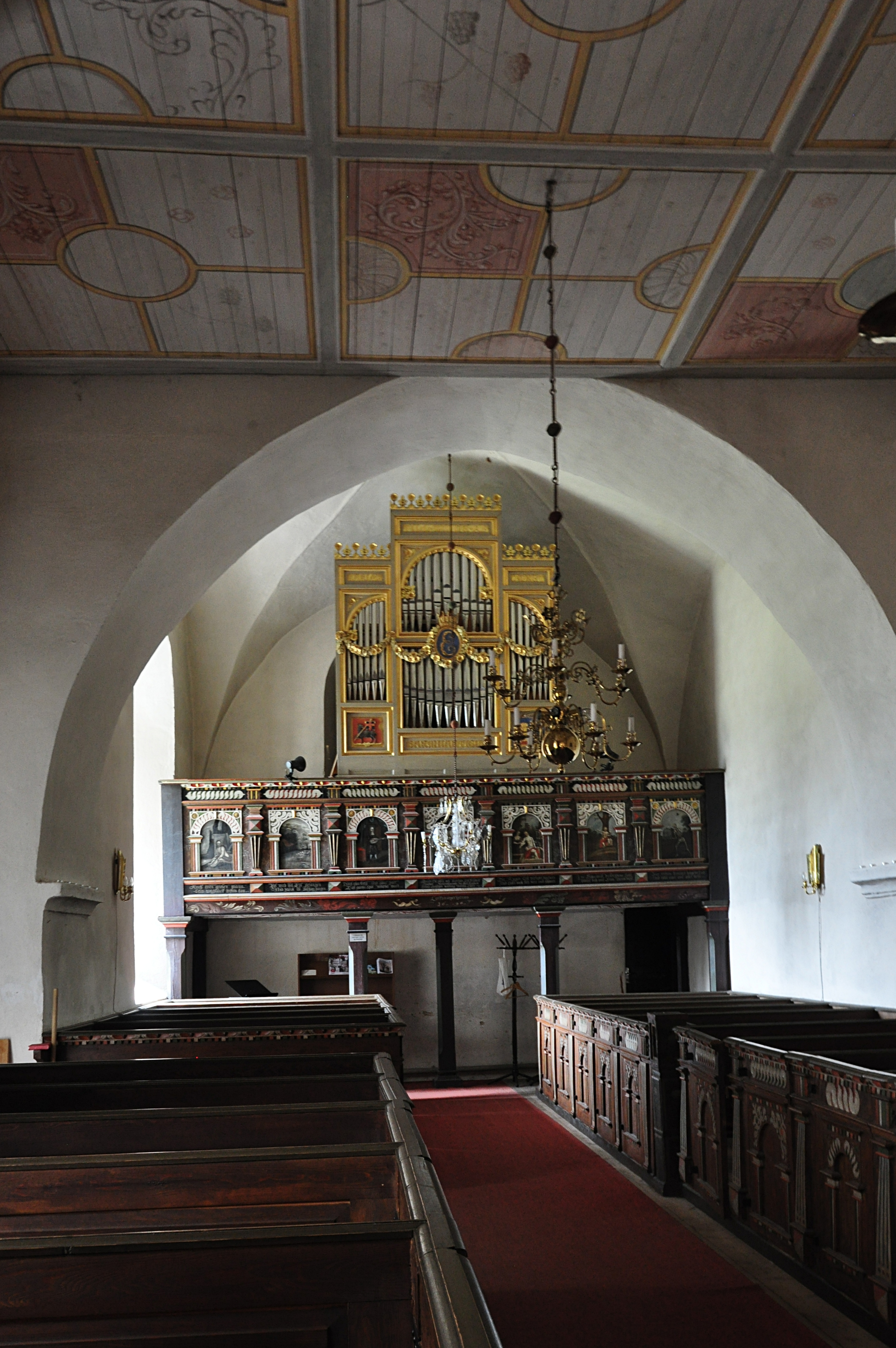 Västerhejde kyrka (Västerhejde kyrkogården 1:1)